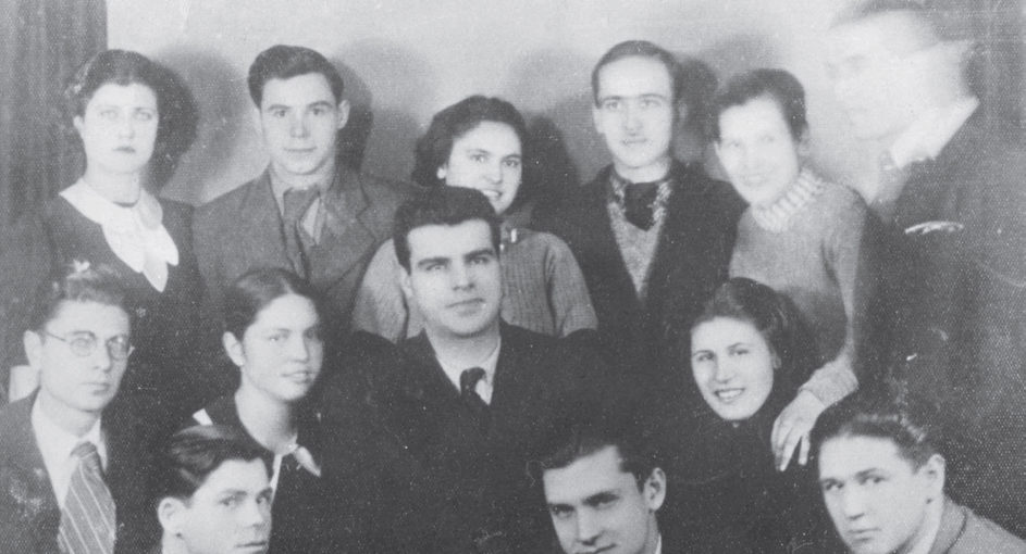 Роза Койзеклиева (втората от ляво надясно на втория ред) заедно с активисти на ММТРО.